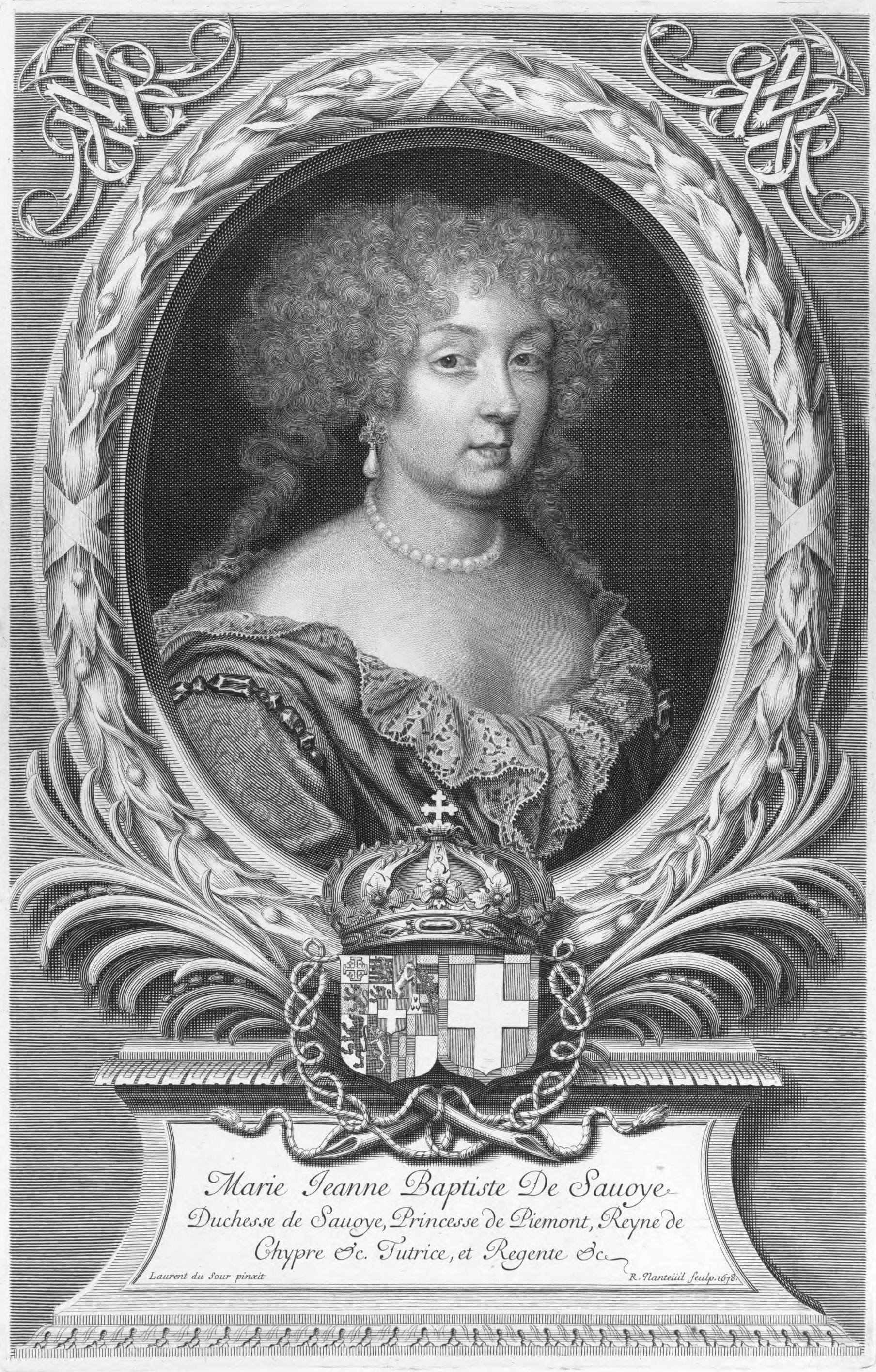 Porträt Maria Johanna Baptistas von Savoyen, Herzogin von Savoyen